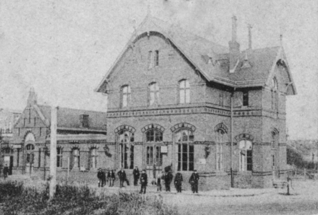 Bahnhof Magdeburg Südost